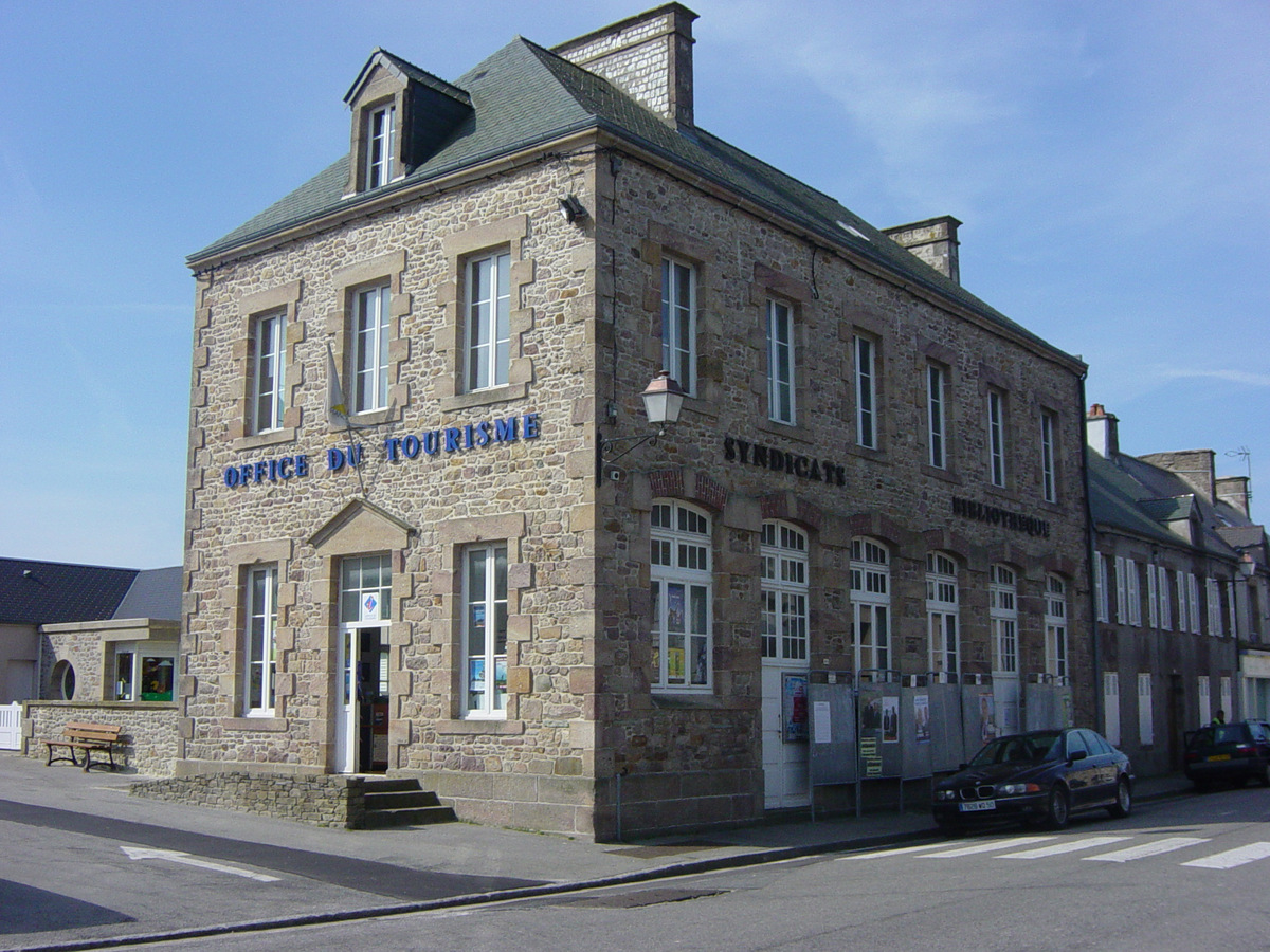 Le bâtiment de l'office de tourisme à Beaumont-Hague.